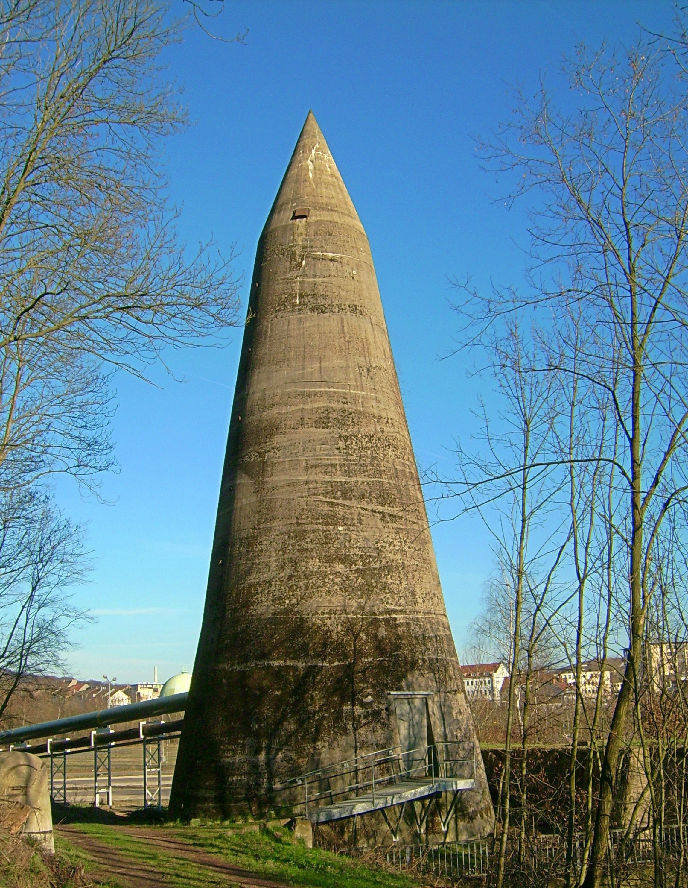 Hochbunker in Neunkirchen (Saar)